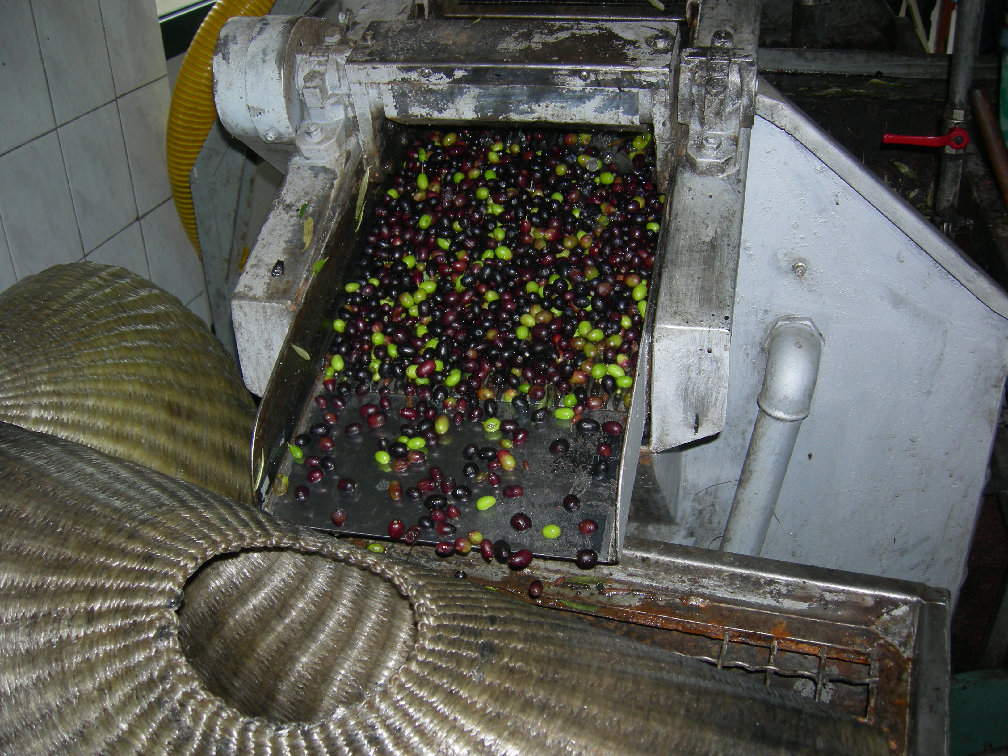 Frantoio Maraldi, Loc. Troghi Firenze